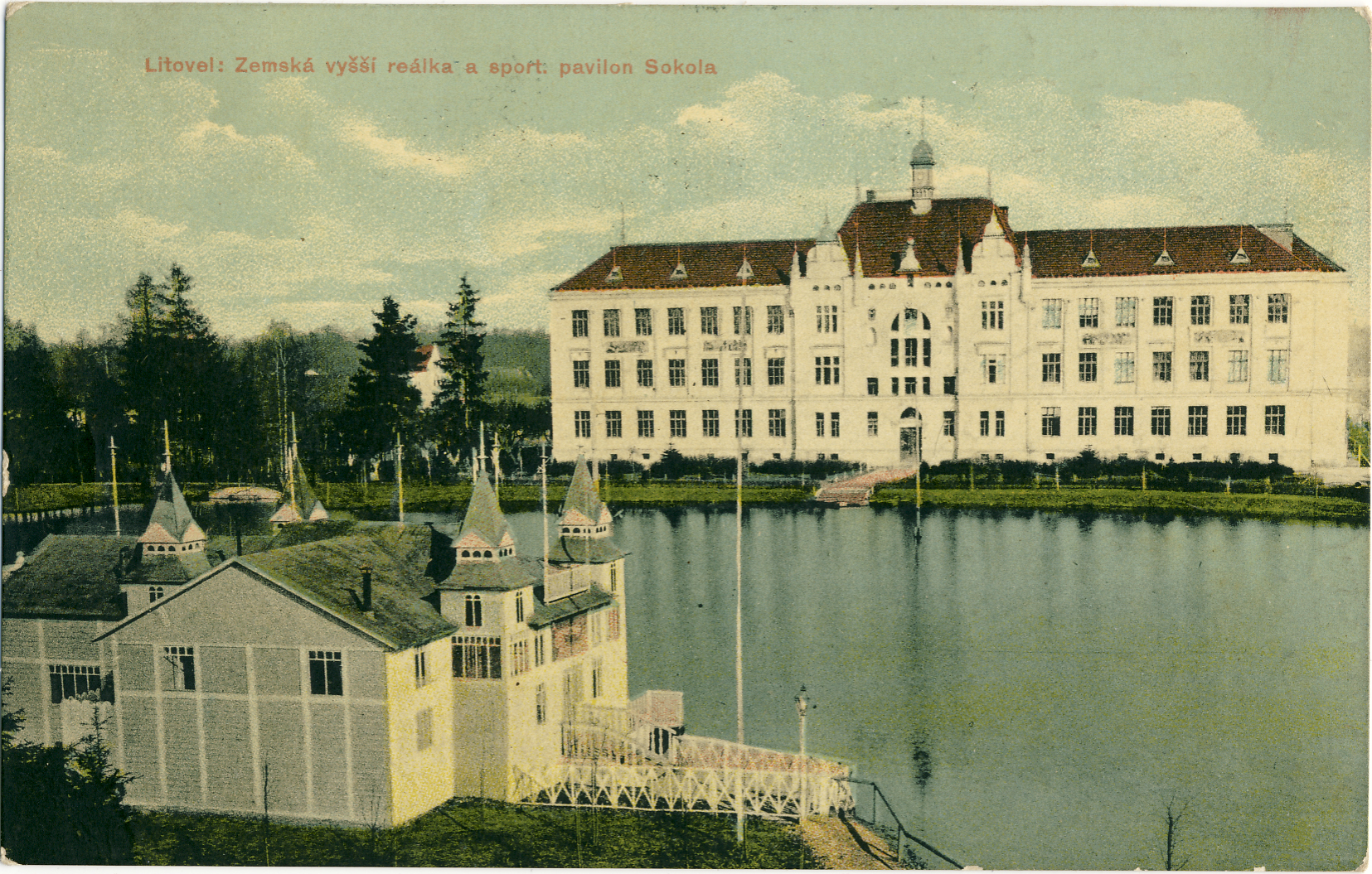 Reálné gymnázium (v pozadí), pavilon Sokola (v popředí) a Uničovský rybník v Litovli na pohlednici z roku 1910.